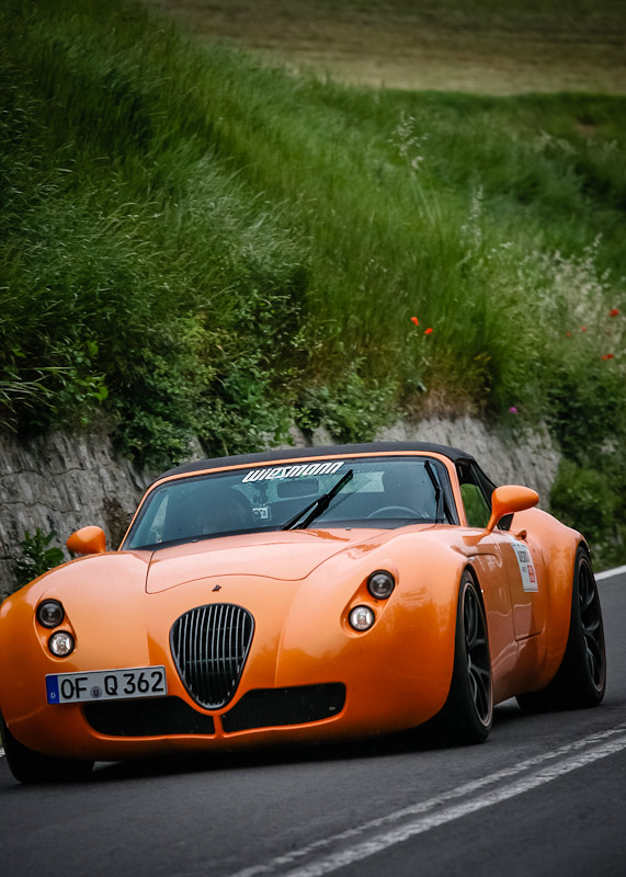 1000 miglia 2012 - SS della Futa . Pianoro (BO)